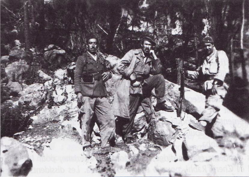 De gauche a droite Abdeldjebbar Dorghal, Mostéfa Merarda, Lakhdar Gouaref